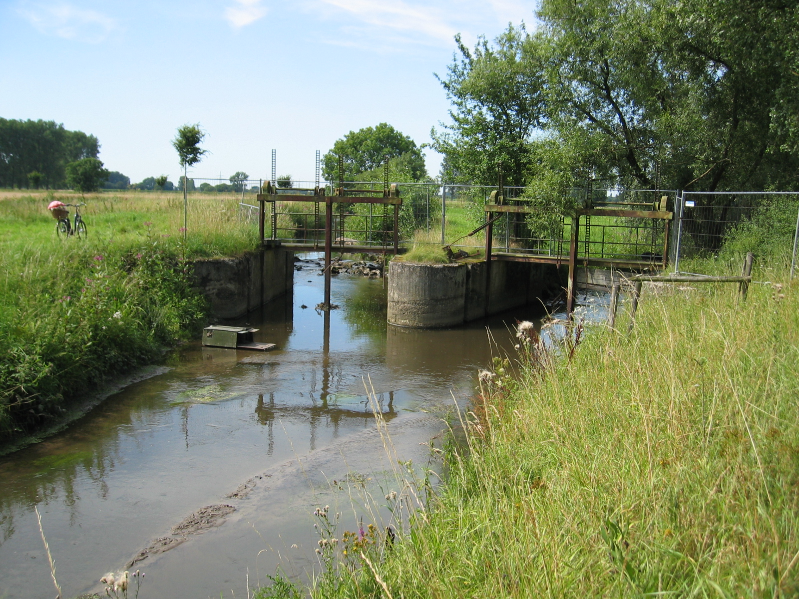 Verbindung der Wurm (links) zum Teichbach (rechts), der ab hier Erlenbach genannt wird.